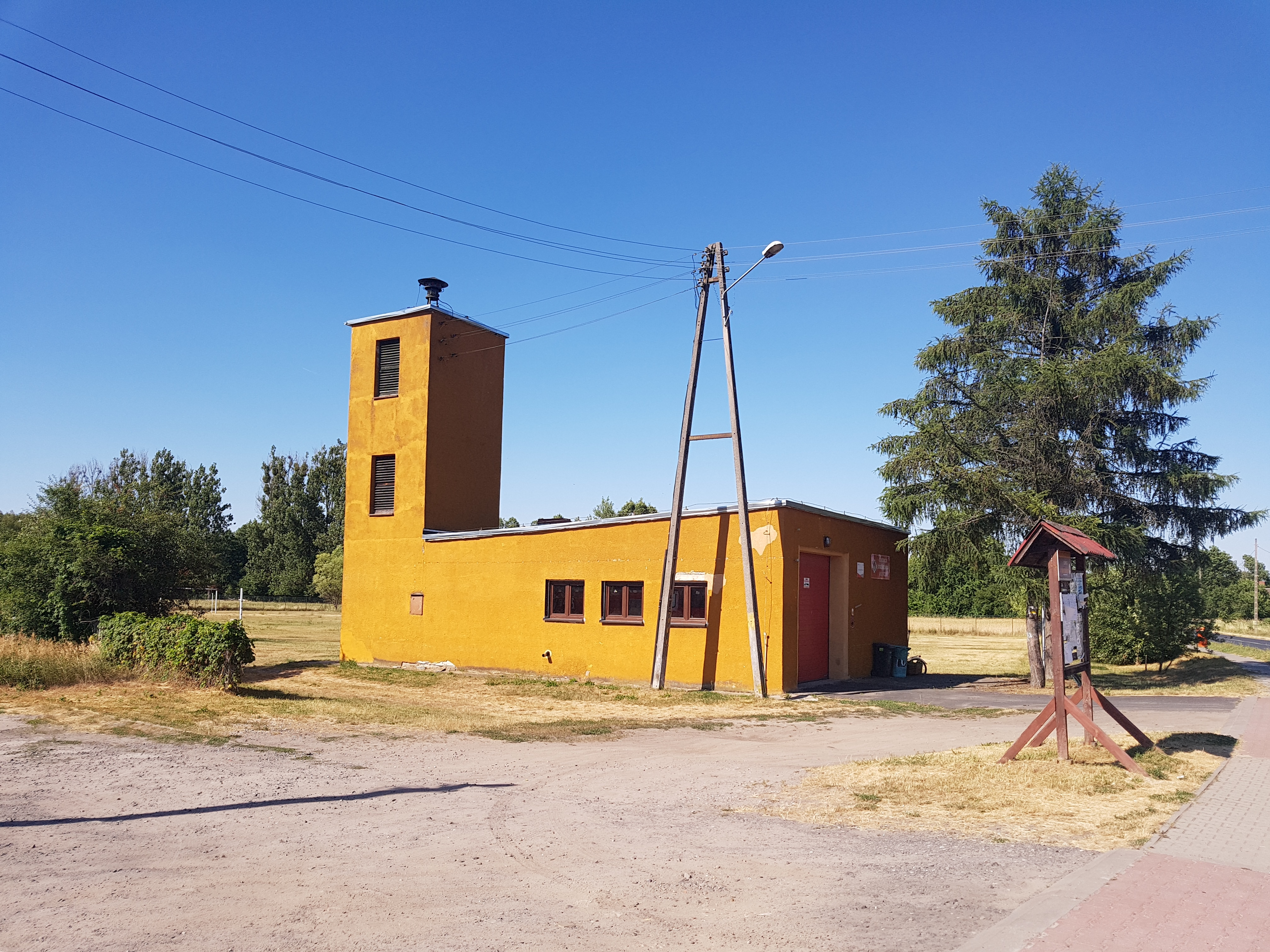 Ochotnicza Straż Pożarna w Sierczu